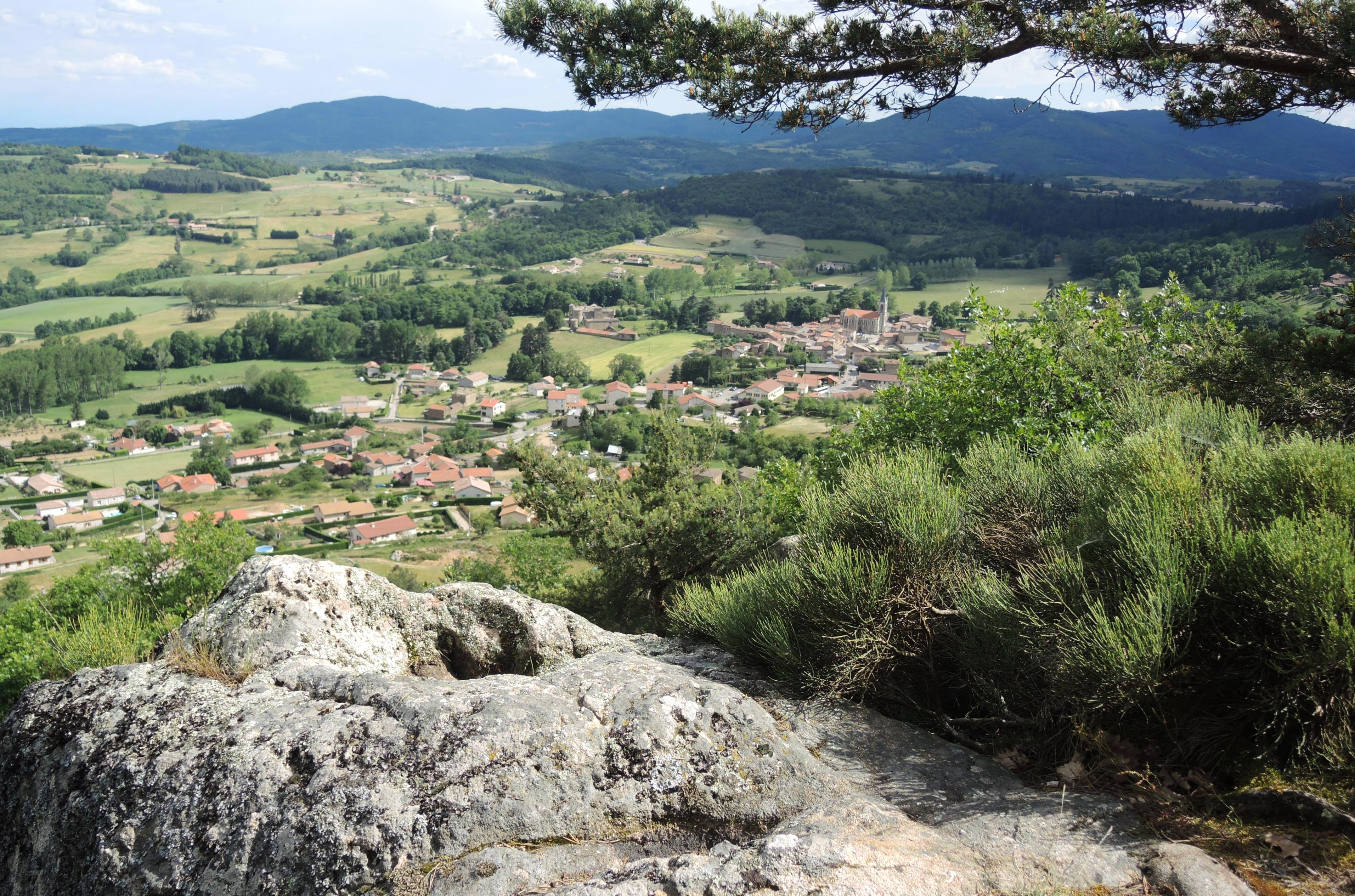 Saint-Alban d'Ay Peyreboeuf 2 cupules et village